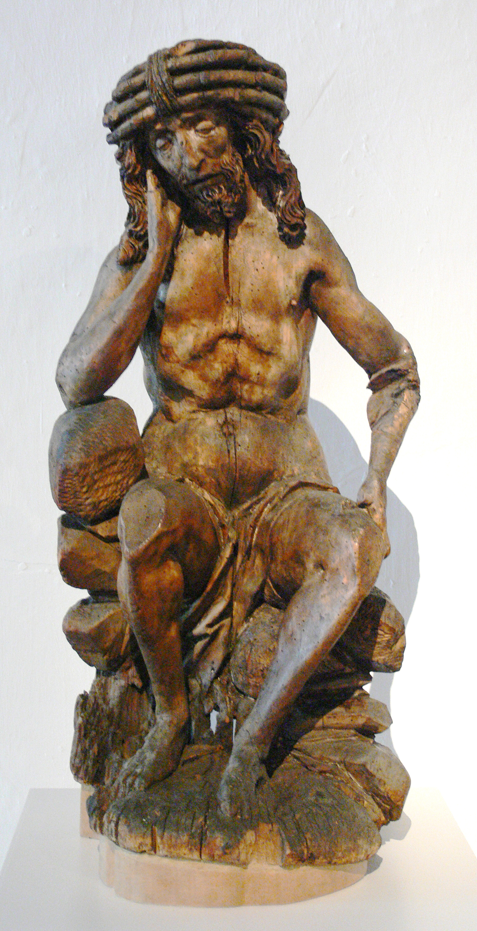 Peter Breuer: Christusin der Rast, vermutlich aus Zwickau, Anfang 16. Jh., Lindenholz (ehemals polychrome Fassung) Staatliche Kunstsammlungen Dresden, Skulpturensammlung, SAV 3997 (ausgestellt im Schloßbergmuseum Chemnitz)